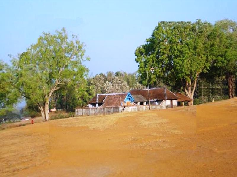 അഞ്ചുമൂർത്തിക്ഷേത്രം, ആലത്തൂർ, പാലക്കാട്